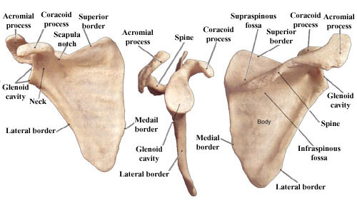 Тұлға қабырғасының құрылысы